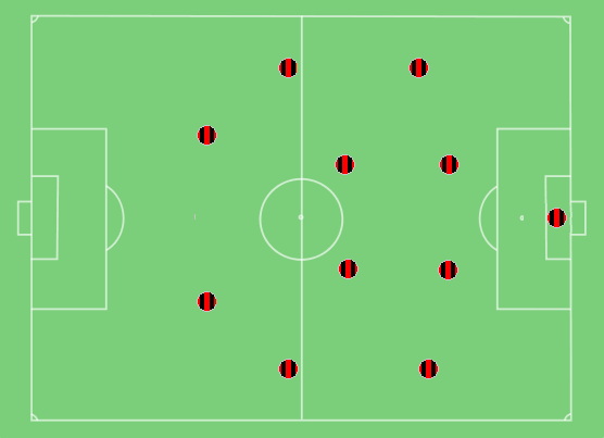 Taktyka i ustawienie Milanu w finale Pucharu Europy 1989 AC Milan tactics - European Cup 1989 final Giovanni Galli — Mauro Tassotti, Alessandro Costacurta (Filippo Galli 74'), Franco Baresi, Paolo Maldini — Carlo Ancelotti, Frank Rijkaard, Angelo Colombo, Roberto Donadoni — Ruud Gullit (Pietro Paolo Virdis 60'), Marco van Basten